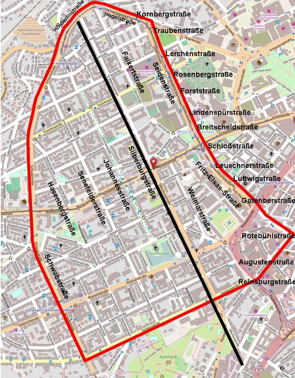 Plan der Silberburgstraße und Umgebung in Stuttgart.